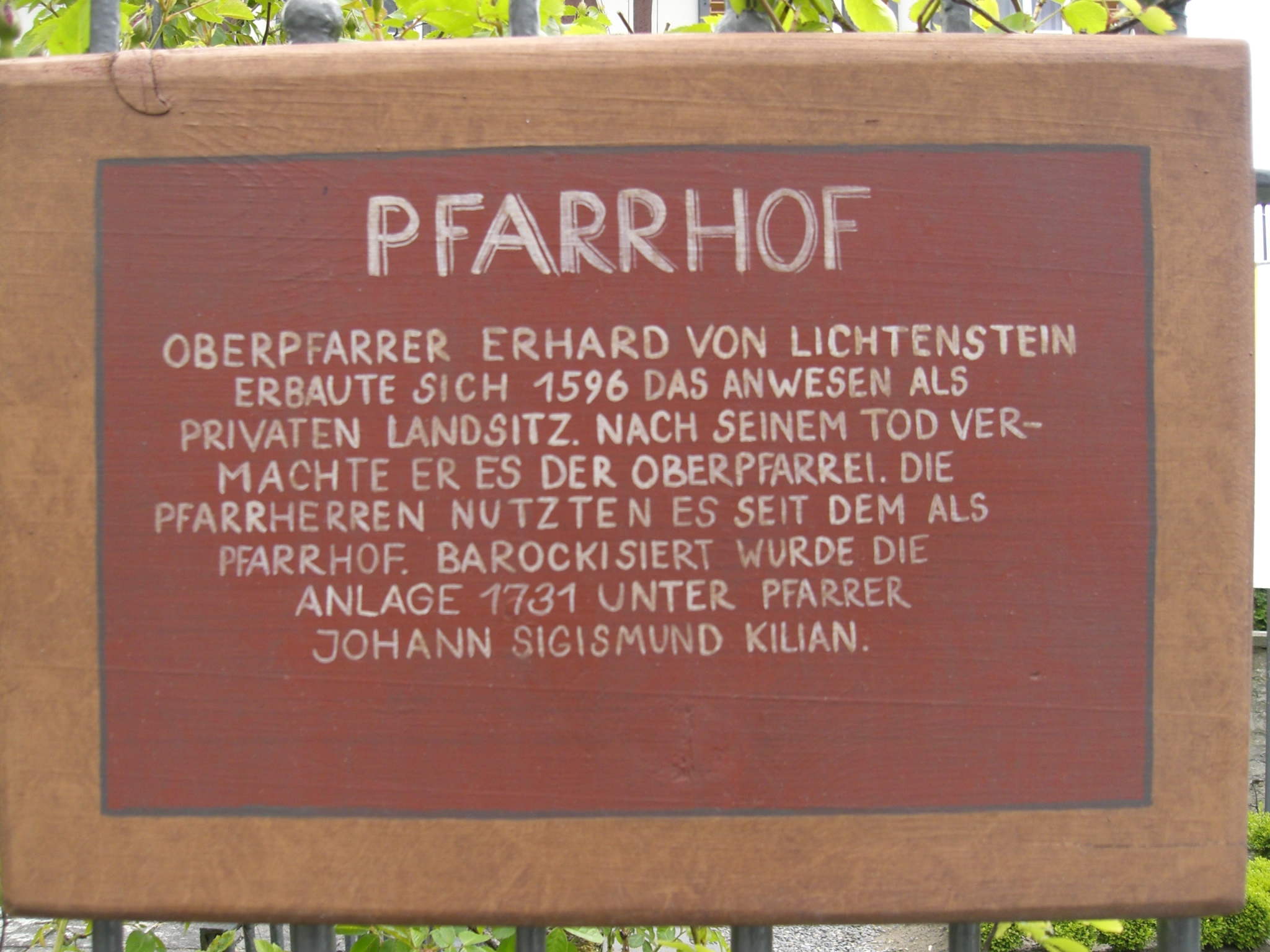 Gedenktafel am Pfarrhof in Greßthal